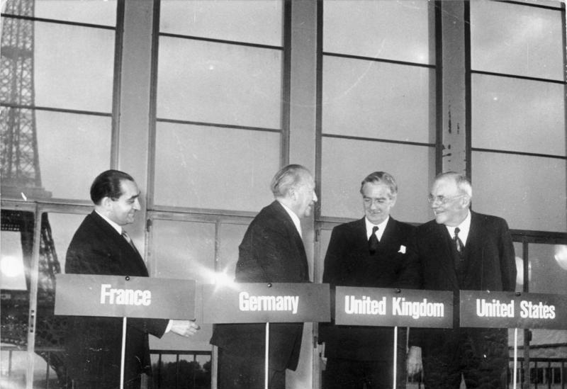 Adenauer und Vertreter der Westmächte verhandeln in Paris über die Wiederaufrüstung Westdeutschlands (Frankreich). In den Räumen von Otan am 20. Oktober 1954. Von links: der französische Ministerpräsident Mendès-France, Adenauer, der britische Aussenminister Anthony Eden, der amerikanische Aussenminister John Foster Dulles